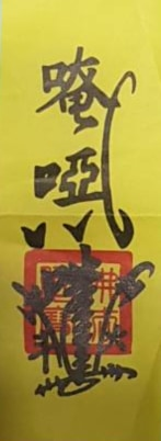 淨符的一種，印三字總持真言。